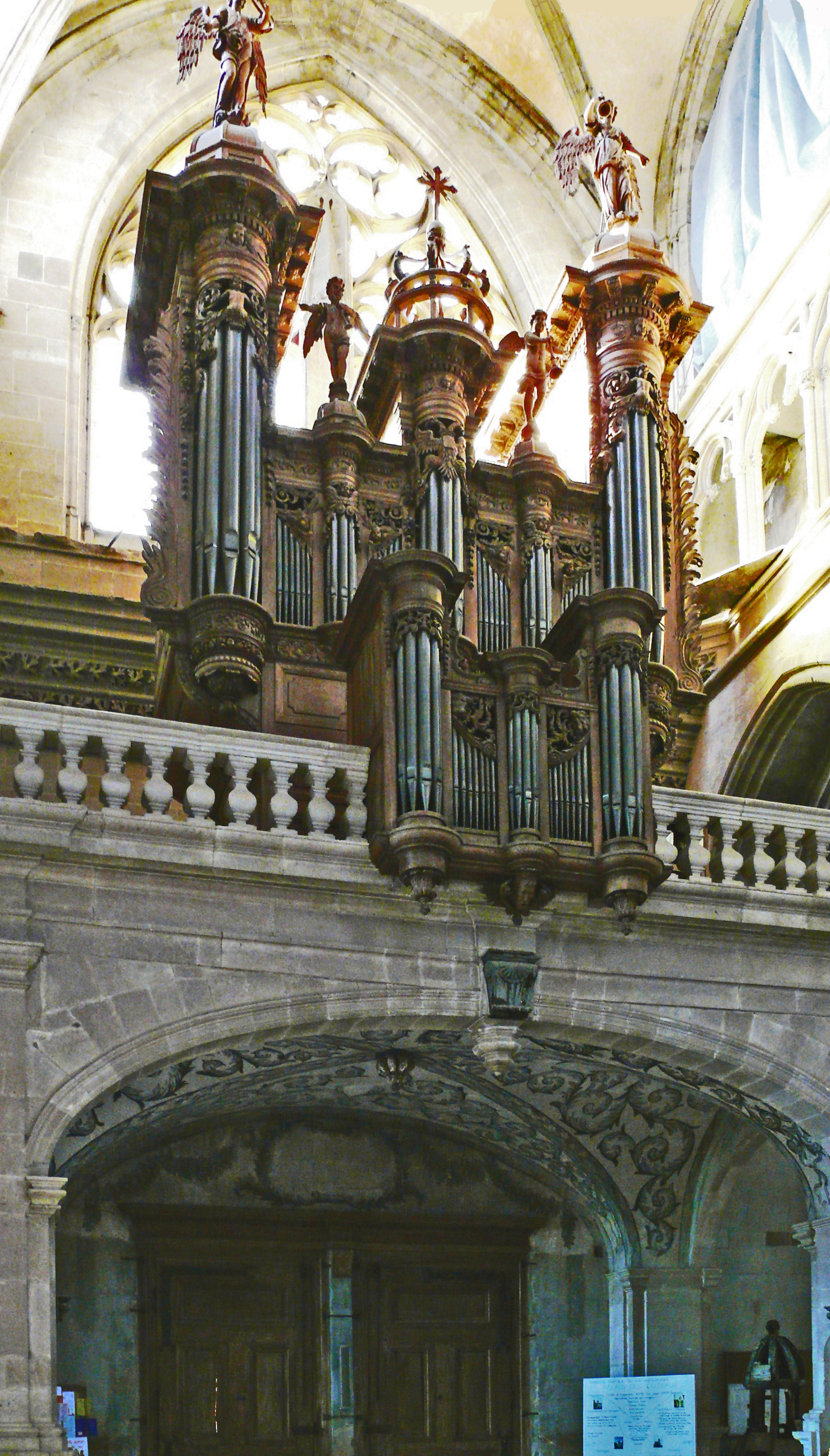 Abbatiale de Saint-Antoine-l'Abbaye - Orgue dont la partie instrumentale a été reconstituée par Bernard Aubertin en 1992, à partir de la tuyauterie subsistante de Samson Scherrer en 1748, dans un buffet dont le grand-corps remonte à l'orgue du frère antonin Jean-Laurent Astruc en 1620.